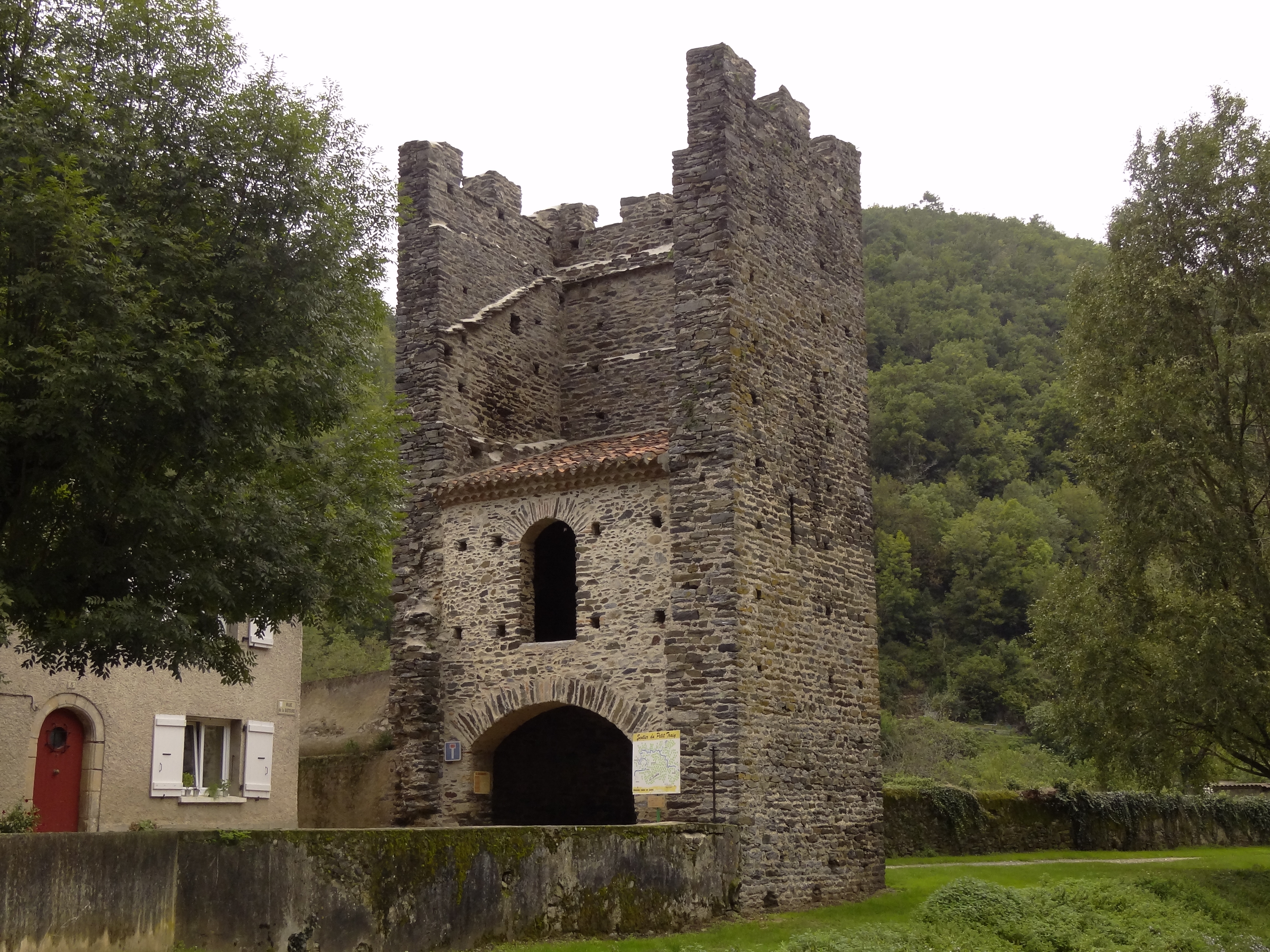 Vue depuis les berges de l'Agout .